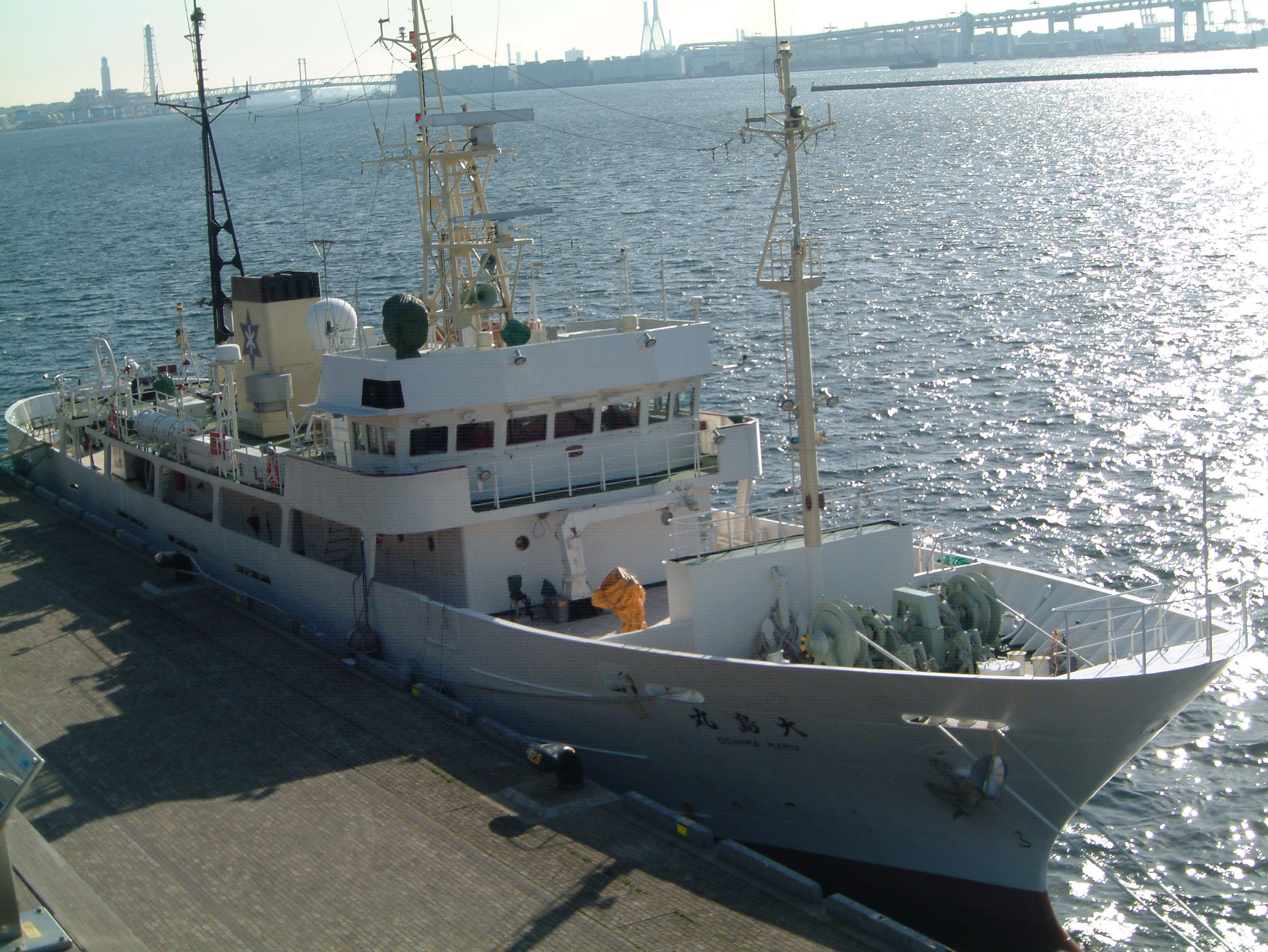 練習船大島丸、2010年、横浜港大さん橋で撮影